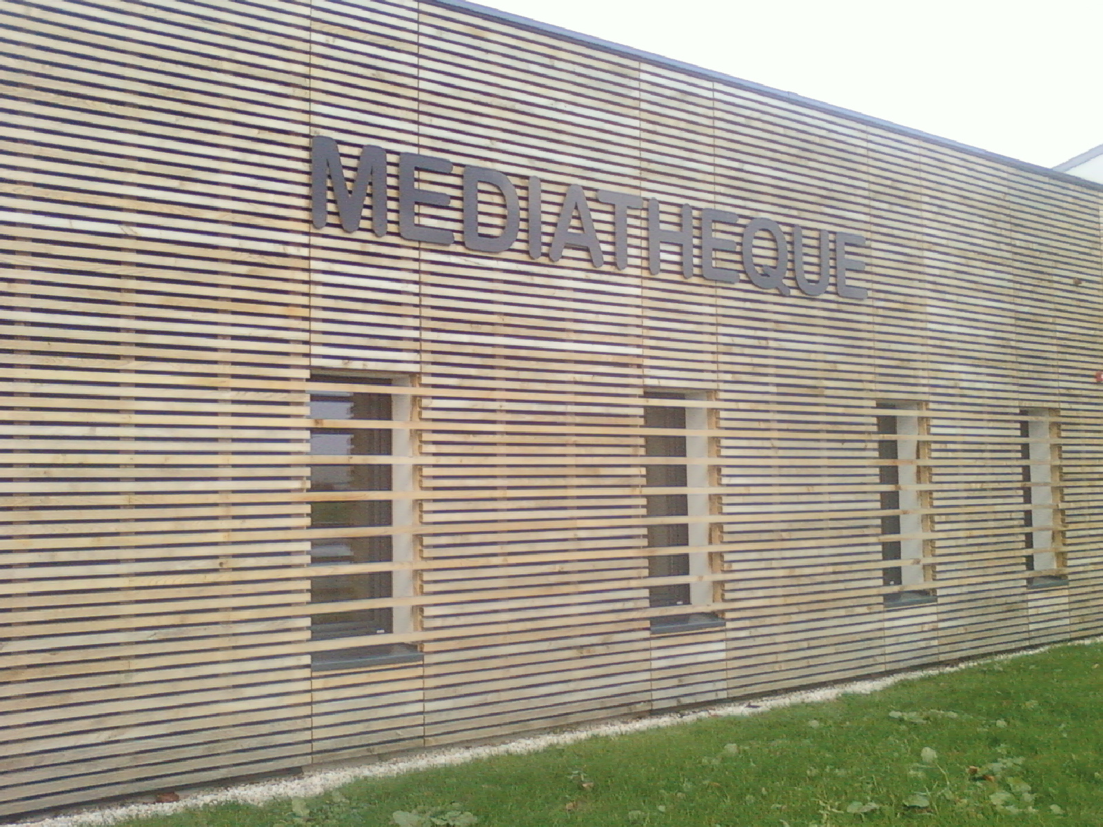 La médiathèque de Ploubalay (Côtes-d'Armor, région Bretagne).